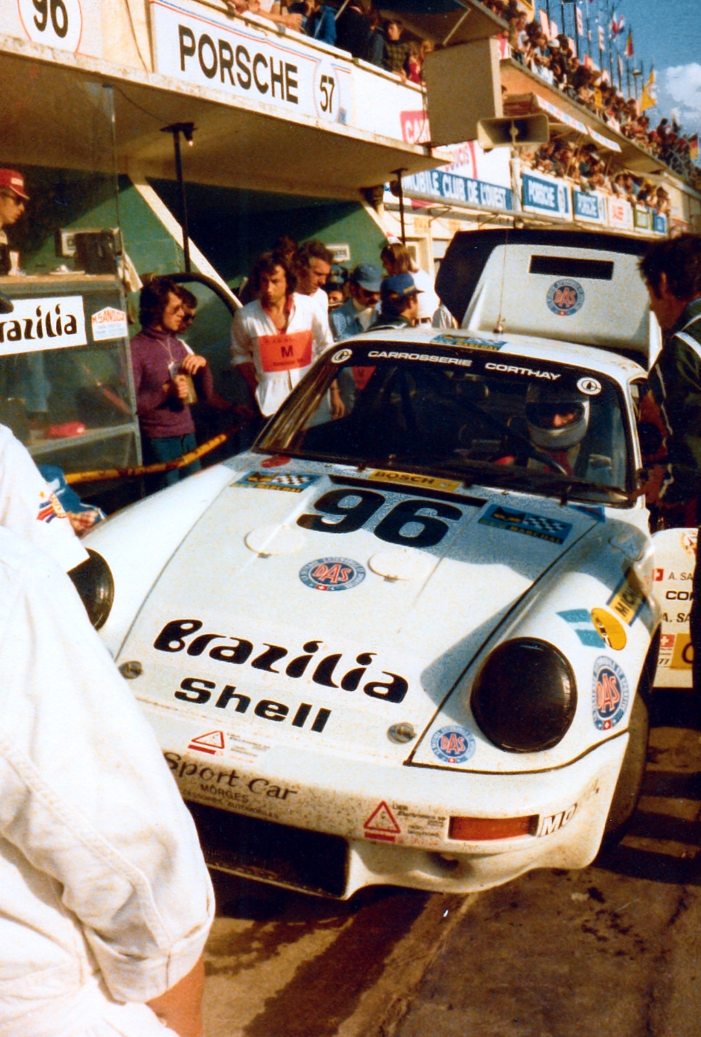 Antoine Salamin au volant, lors des 24 heures du Mans 1977